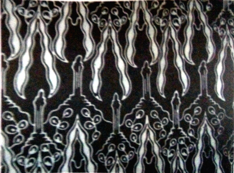 Salah satu contoh motif batik ciri khas Semarang